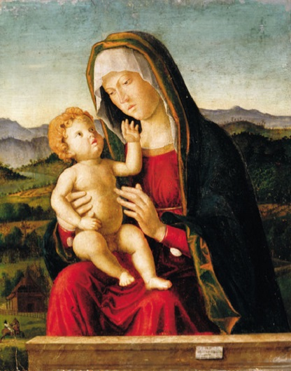 Madonna col Bambino, olio su tavola, 35.8 x 28.4 cm, Szépművészeti Múzeum, Budapest